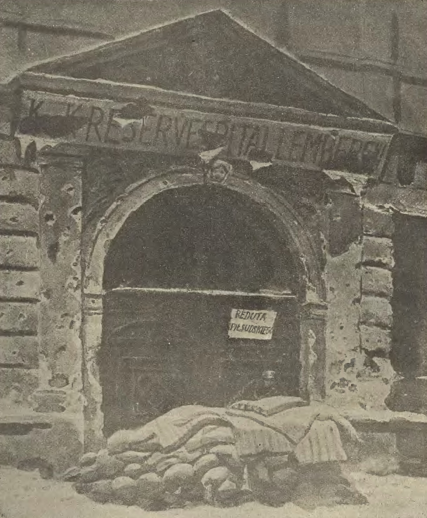 Reduta Piłsudskiego w czasie walk we Lwowie 1918-1919. Ul. Kopernika.